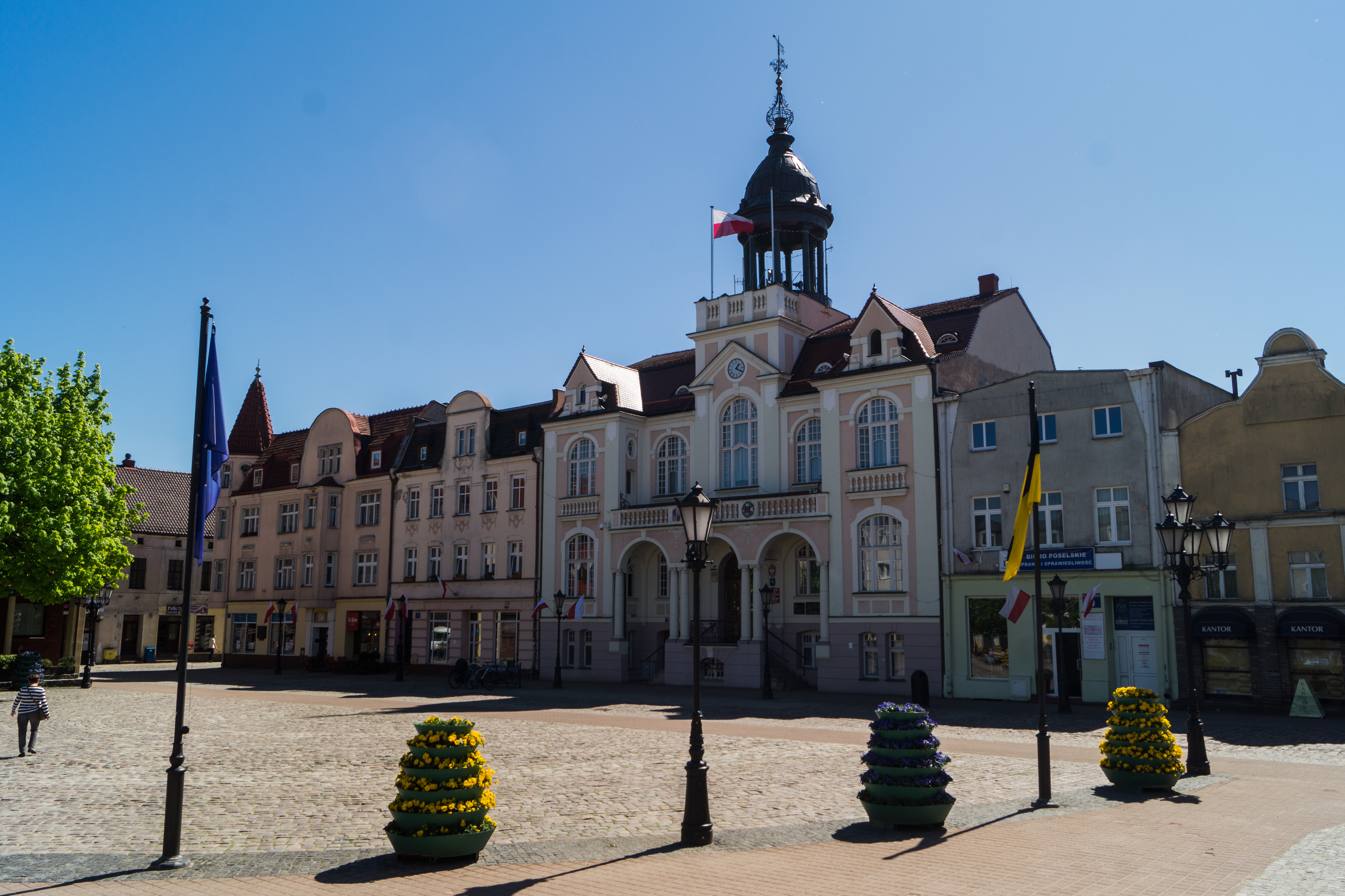 Widok na wejherowski ratusz na placu Jakuba Wejhera.